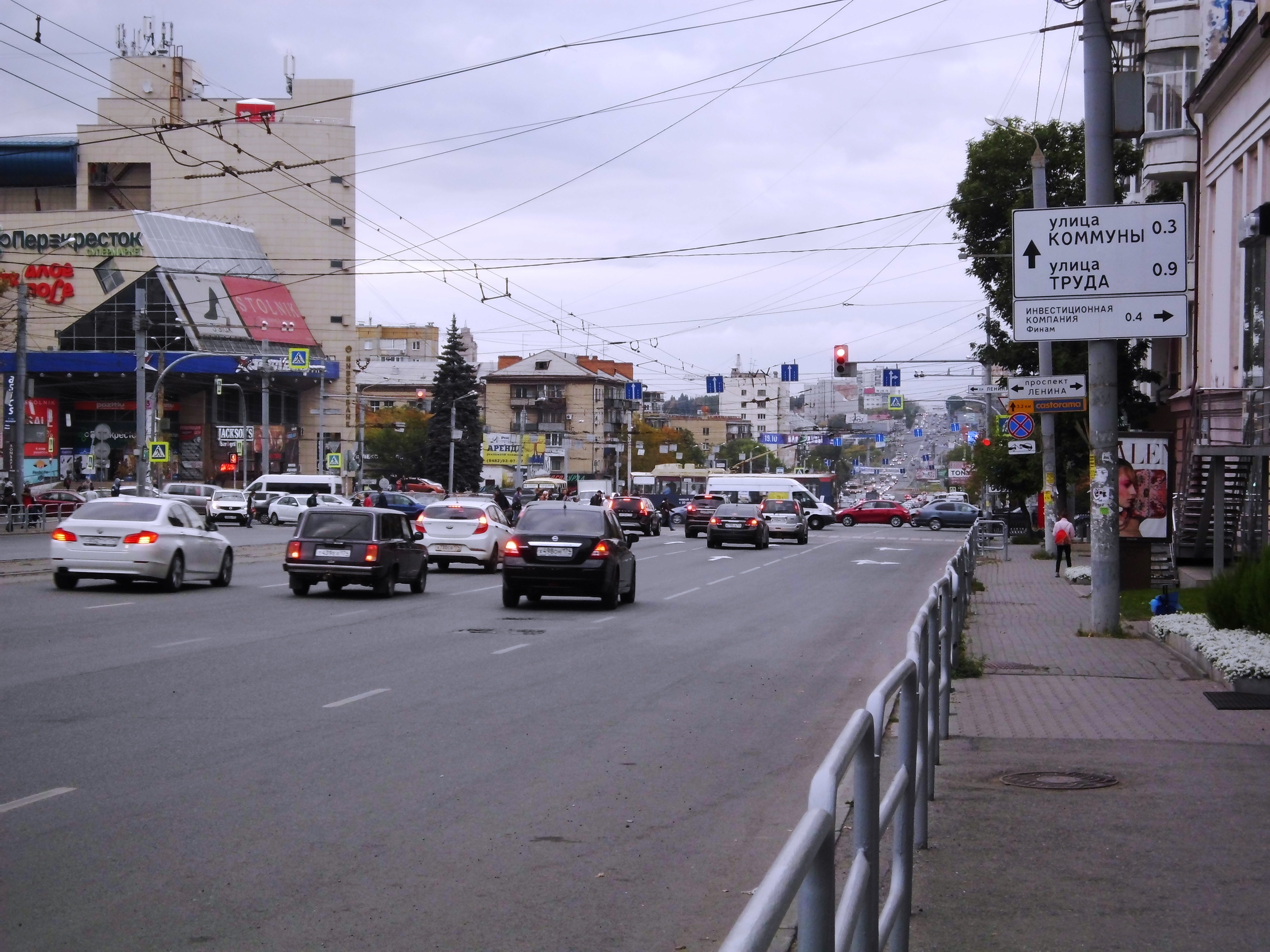 Перекрёсток проспектов Ленина и Свердловского в городе Челябинске. Вид со Свердловского проспекта в северном направлении.